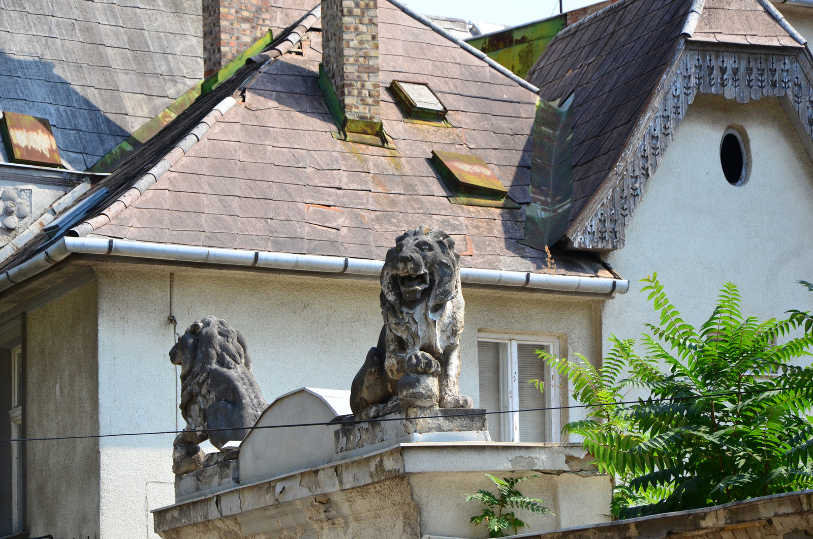 Czuba-Durozier-kastély (Budapest 22, Plébánia utca 11., Plébánia utca 11-13.) This is a photo of a monument in Hungary. Identifier: 11683